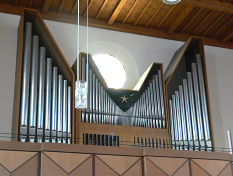 Katholische Pfarrkirche Christus König (Christkönigskirche), Ravensburg Orgel